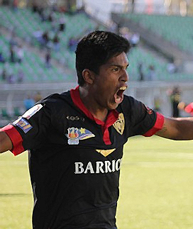 Jugador de Club Deportes Copiapó, Bruno Vides 29